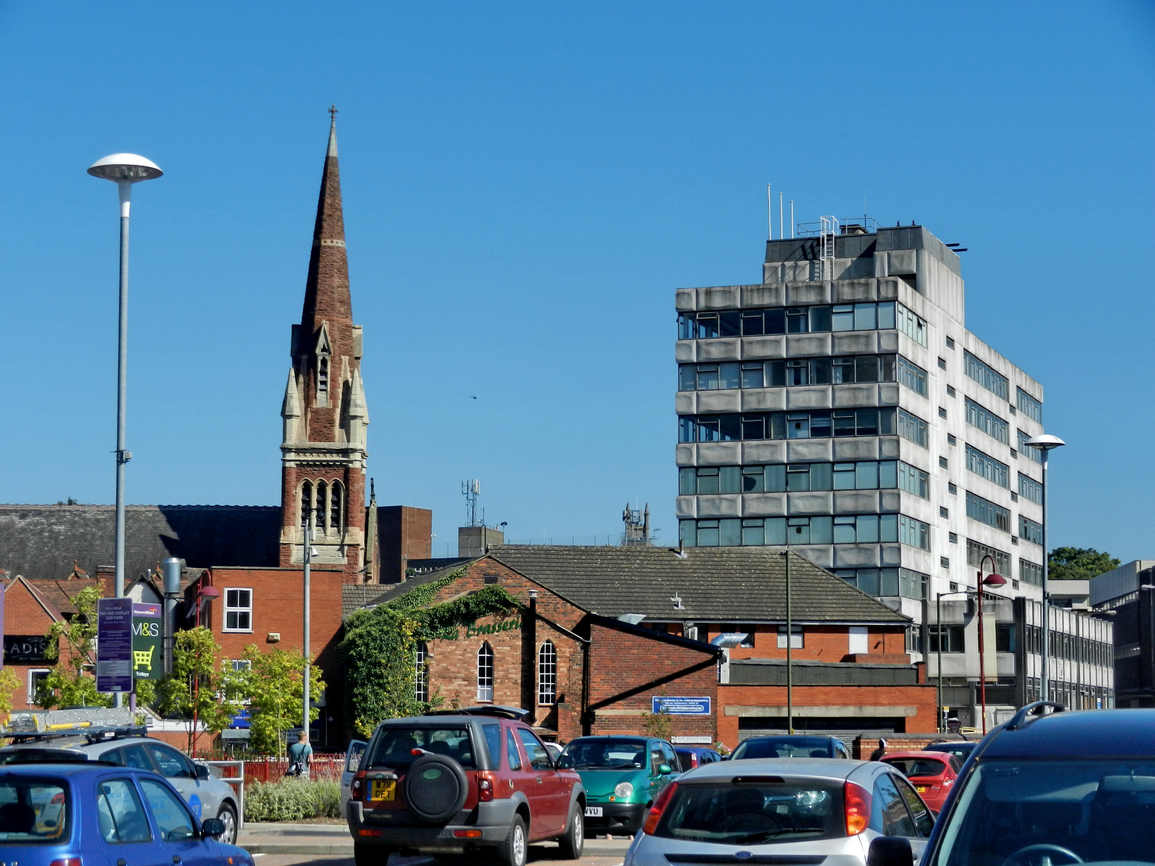 Kiddenminster